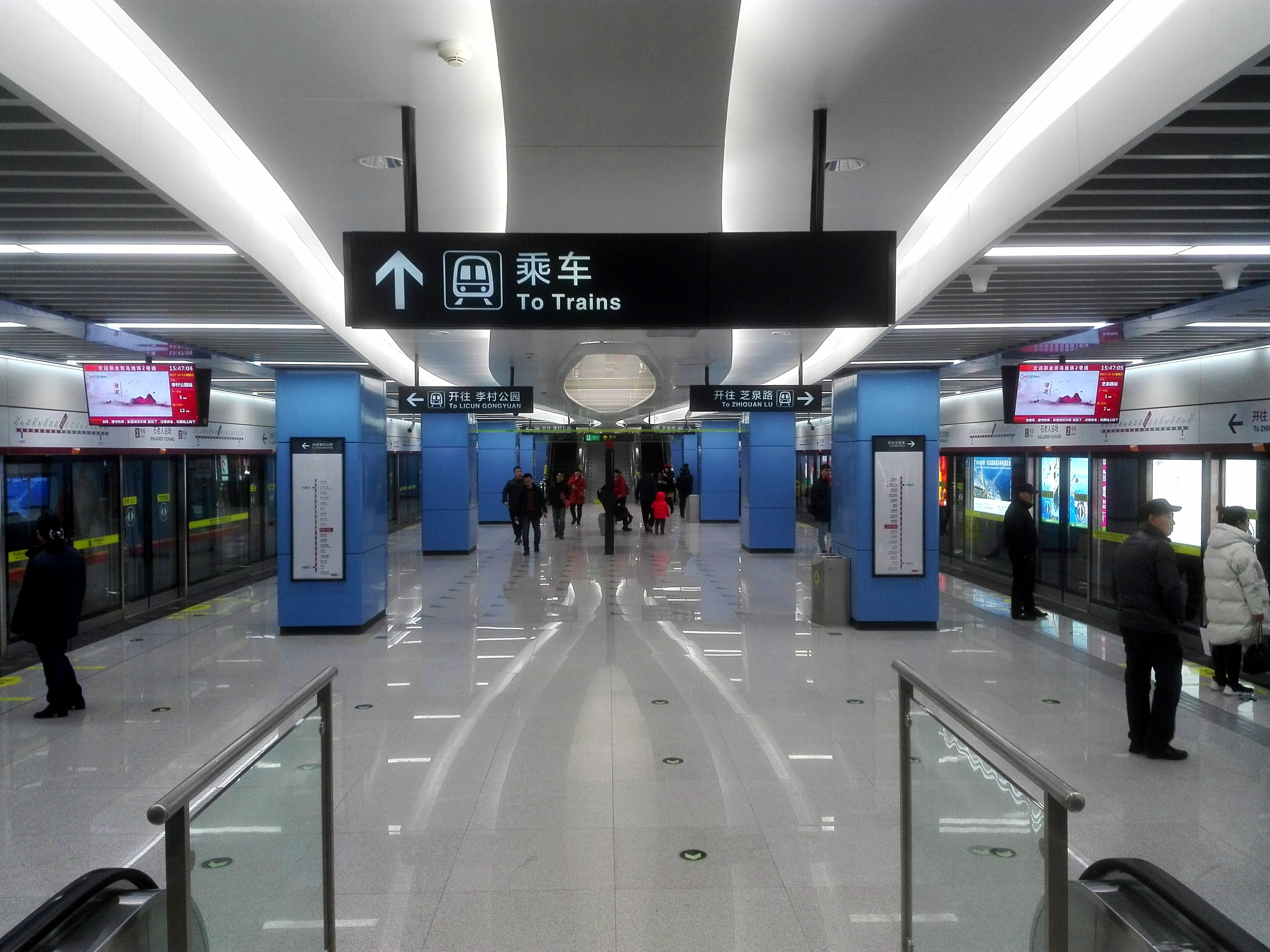 石老人浴场站站台